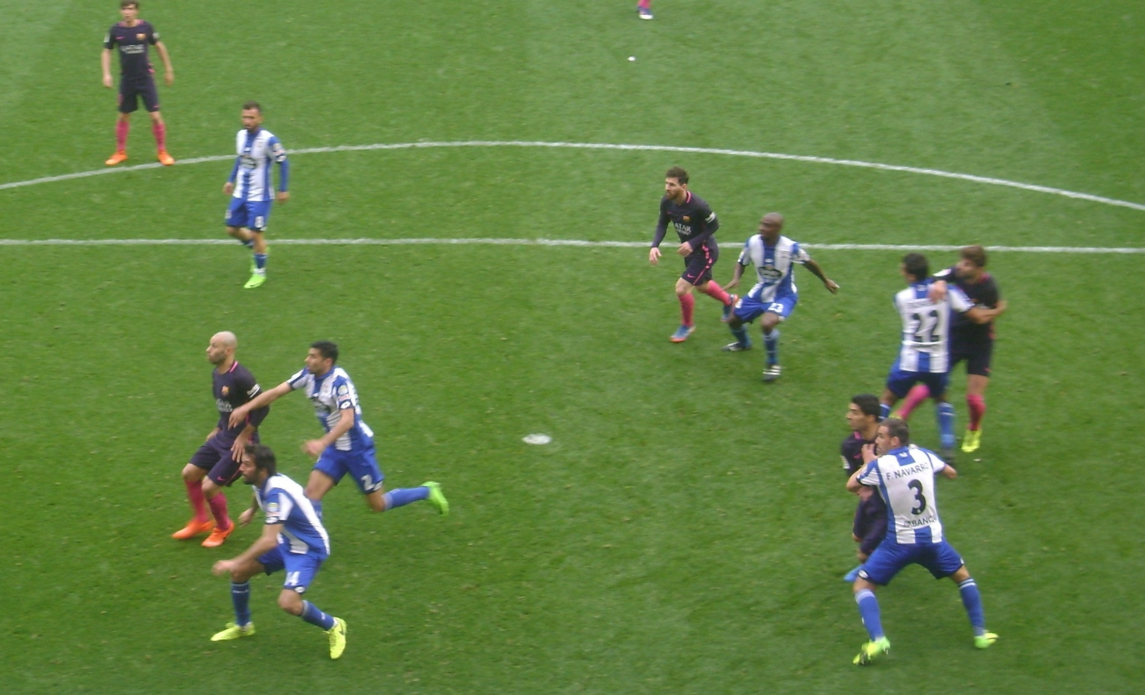 Partido disputado entre el Deportivo de La Coruña y el FC Barcelona durante la temporada 2016-17, con resultado de 2-1.